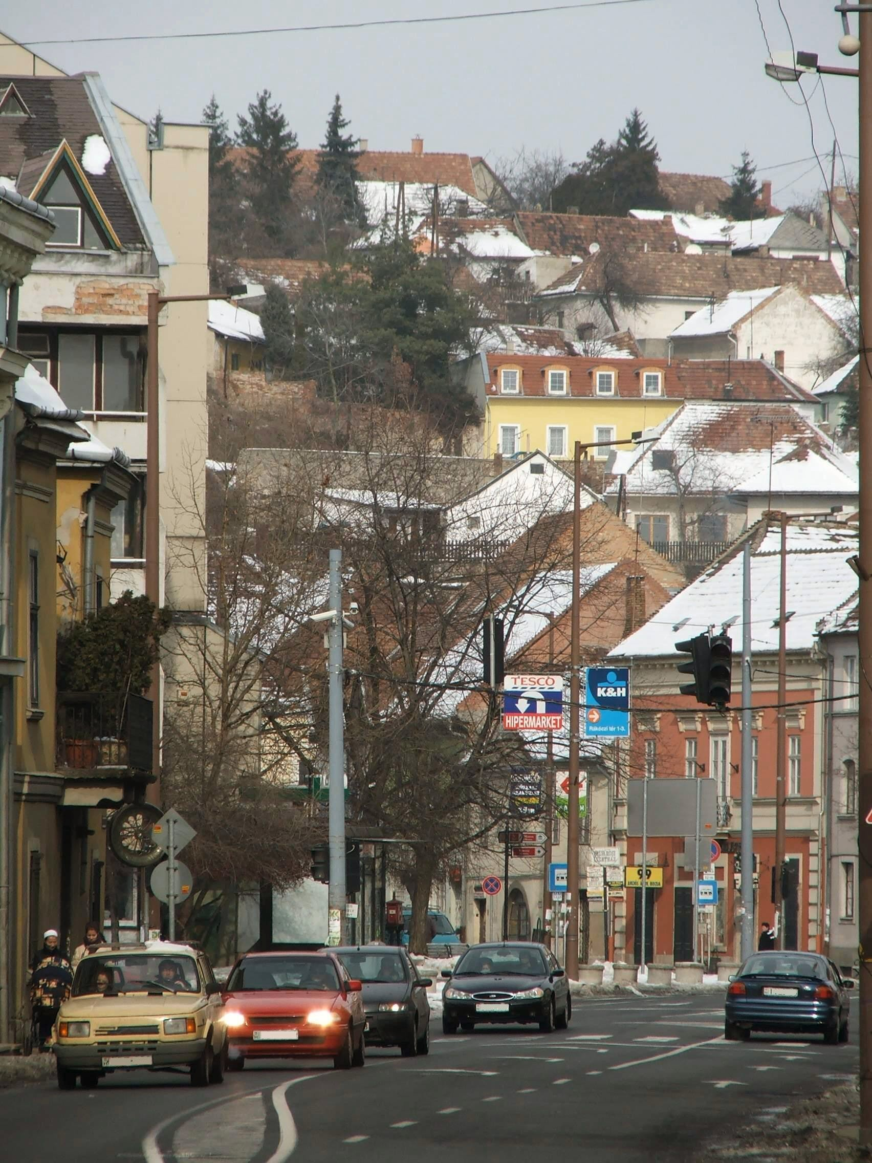 Downtown Esztergom